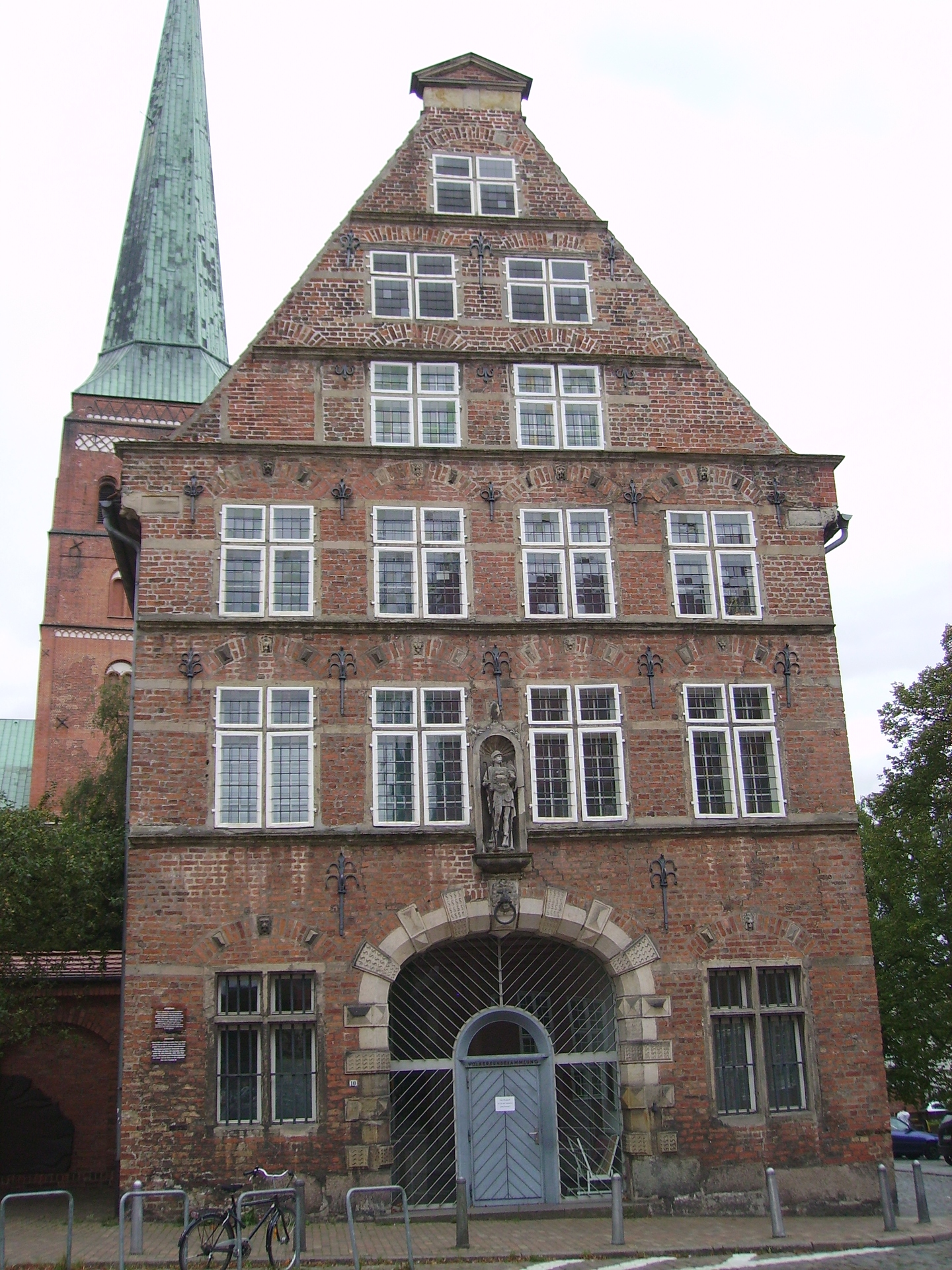 Das Zeughaus in Lübeck This is the photograph of an architectural monument. It is part of the list of cultural monuments of Lübeck